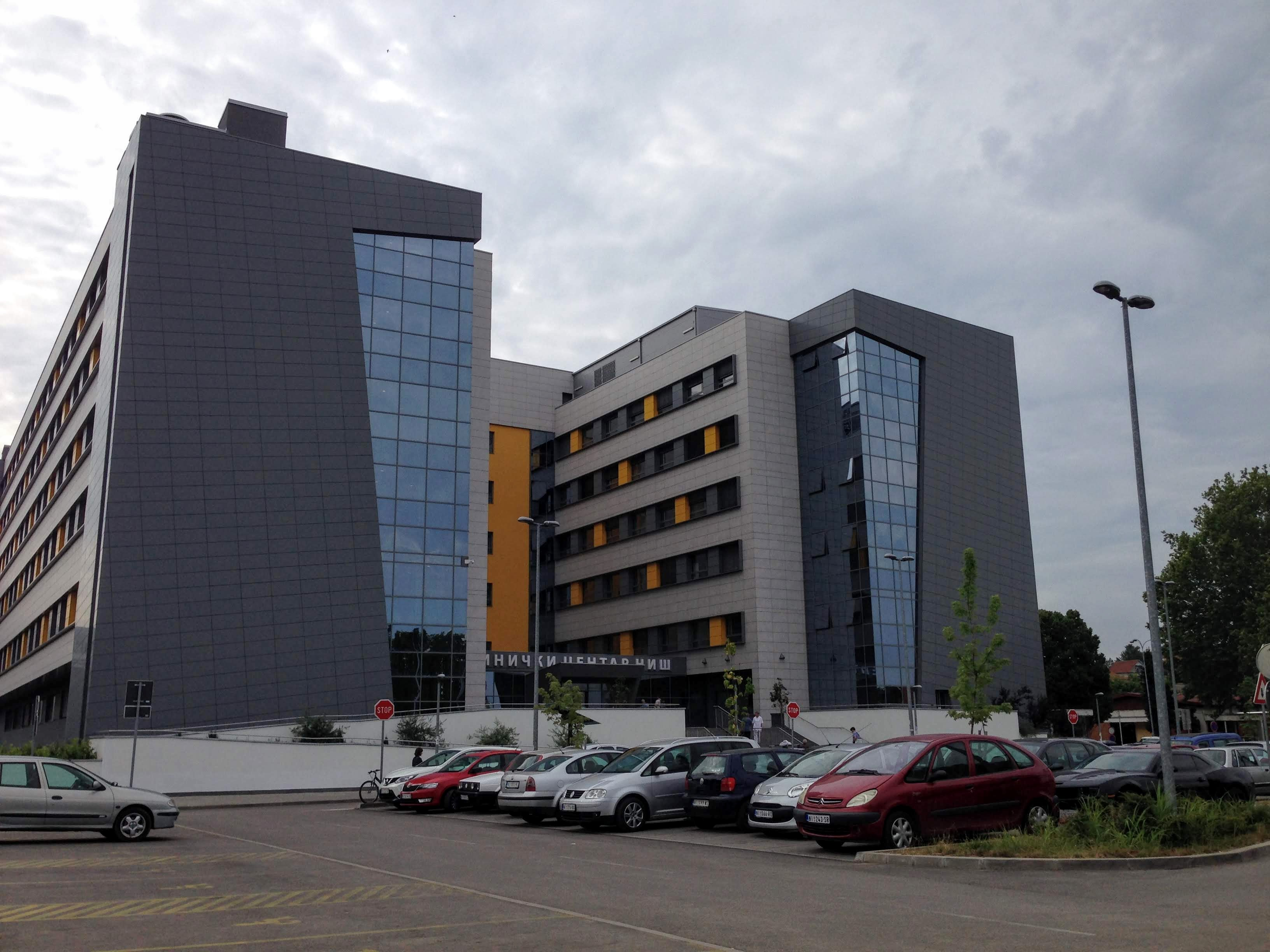 Srpski (latinica): Zgrada novog Kliničkog centra Niš